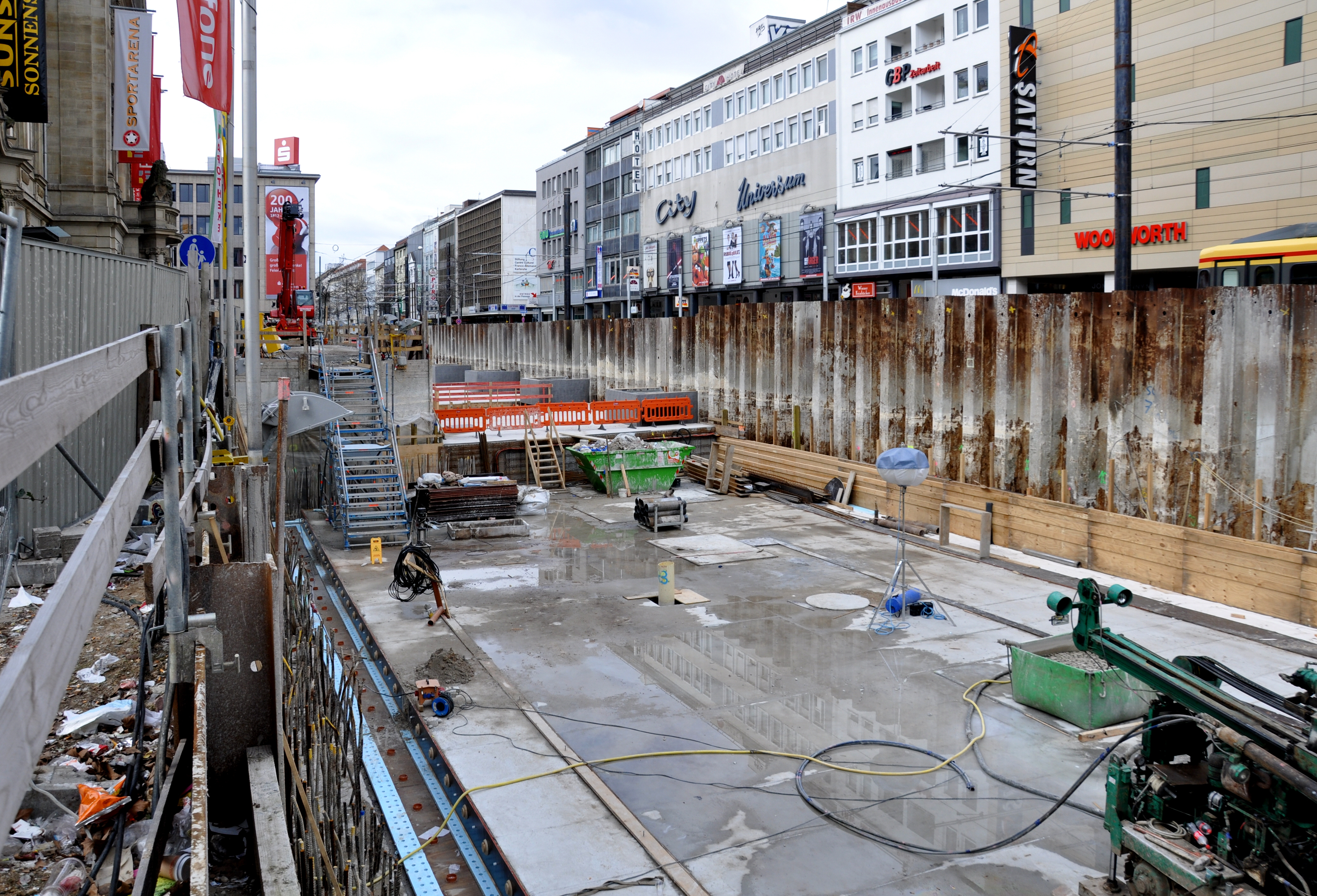 Karlsruhe, U-Bahn-Baustelle Kaiserstraße am Europaplatz